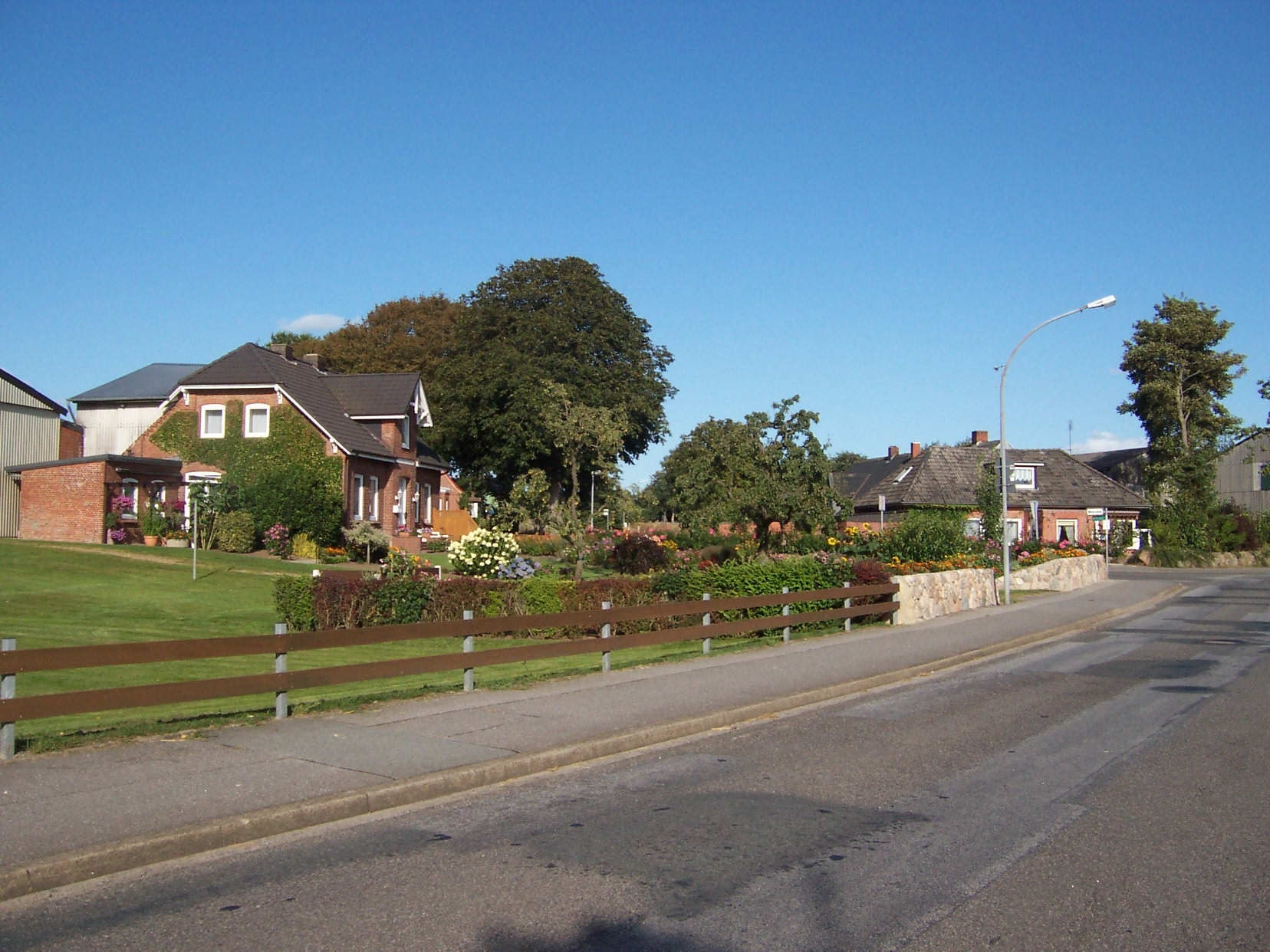 Scorcio di Ahrenshöft